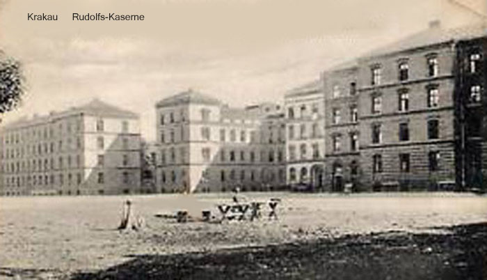 Rudolfskaserne in Krakau in Polen